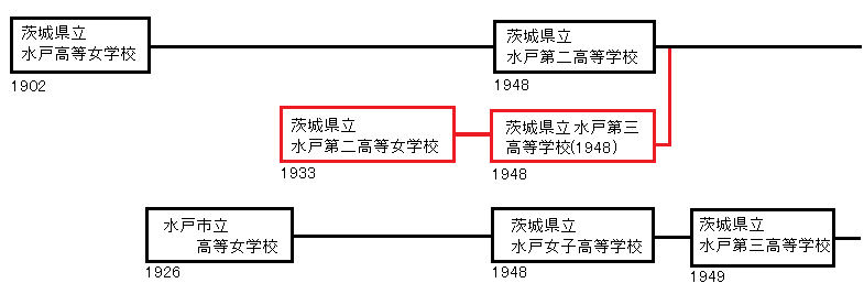 茨城県立水戸第二高等女学校の歴史チャート図 茨城県立水戸第二高等学校と茨城県立水戸第三高等学校との関係性も示す